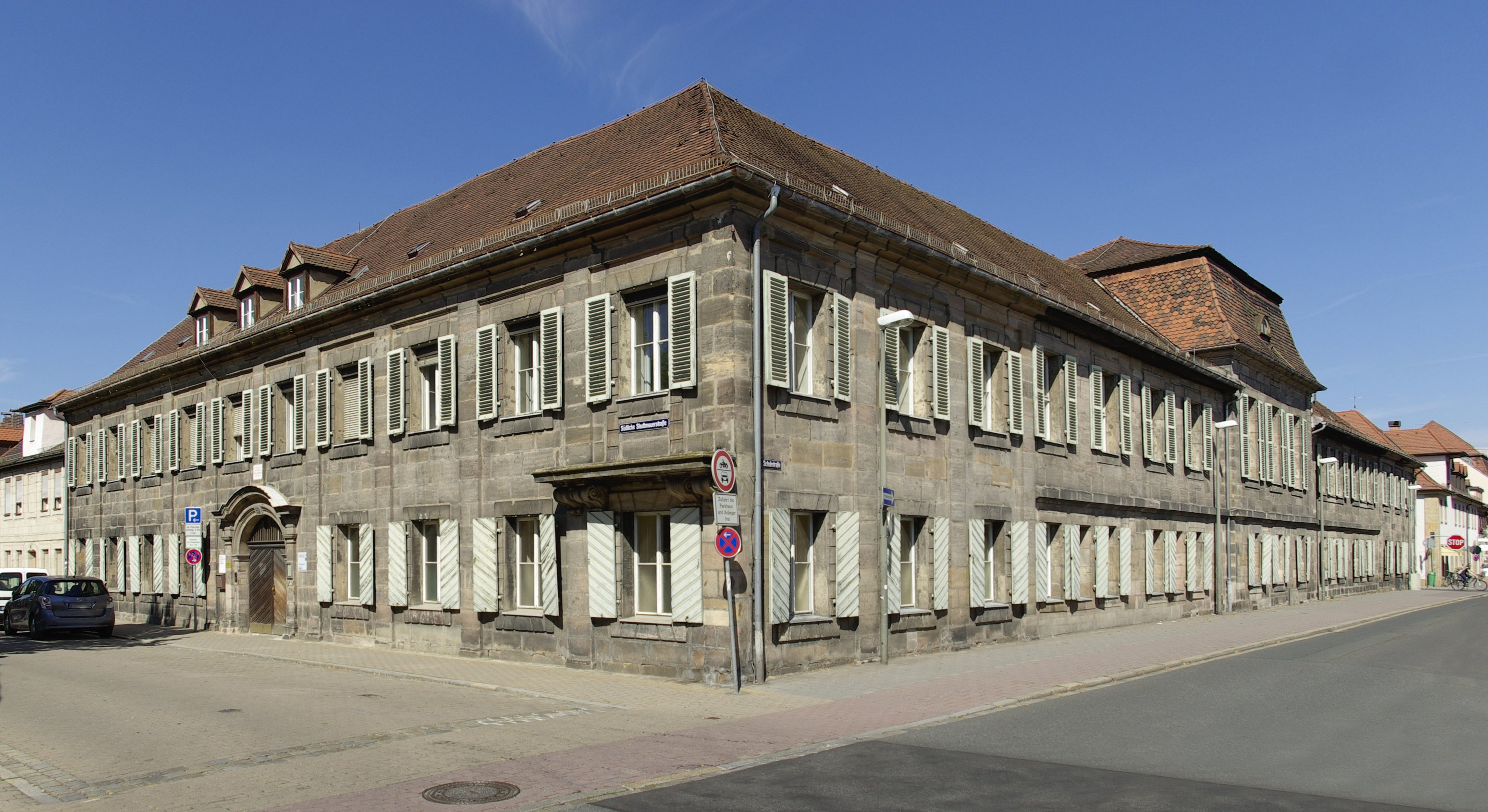 Erlangen, Egloffsteinsches Palais, Ecke Südliche Stadtmauerstraße / Schuhstraße